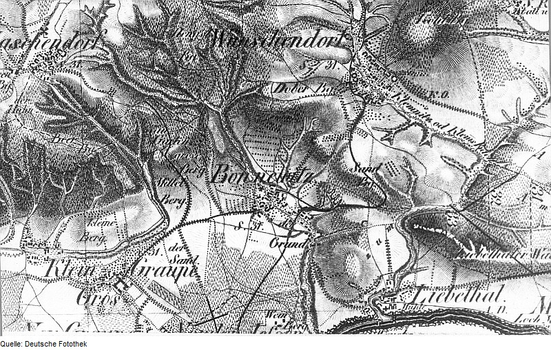 Original image description from the Deutsche Fotothek Pirna-Bonnewitz. Oberreit, Sect. Dresden, 1821/22